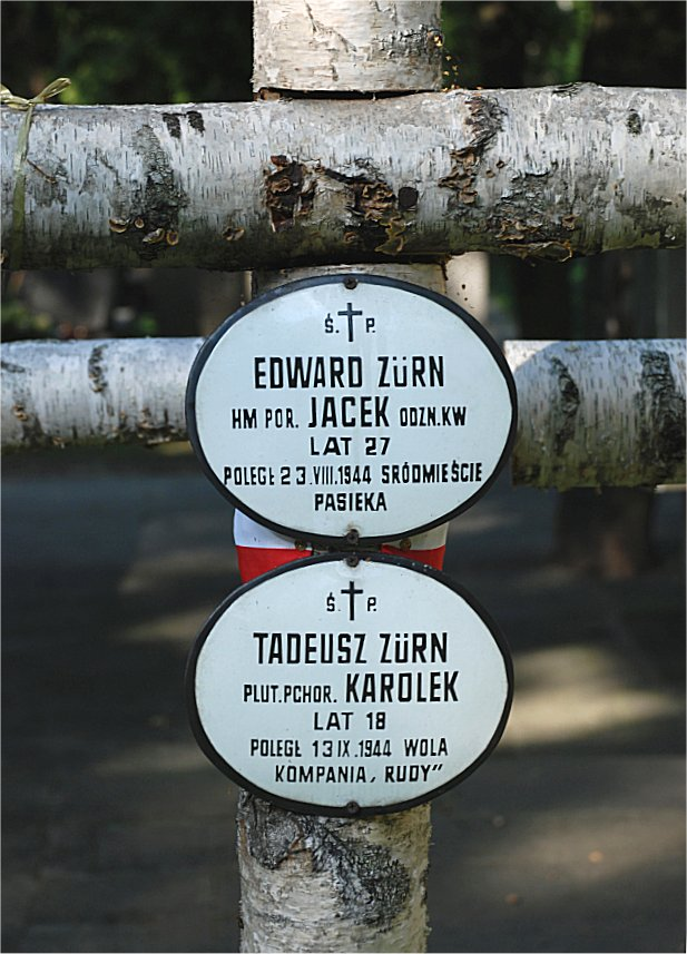 Edward Zurn, grób na Powązkach wojskowych